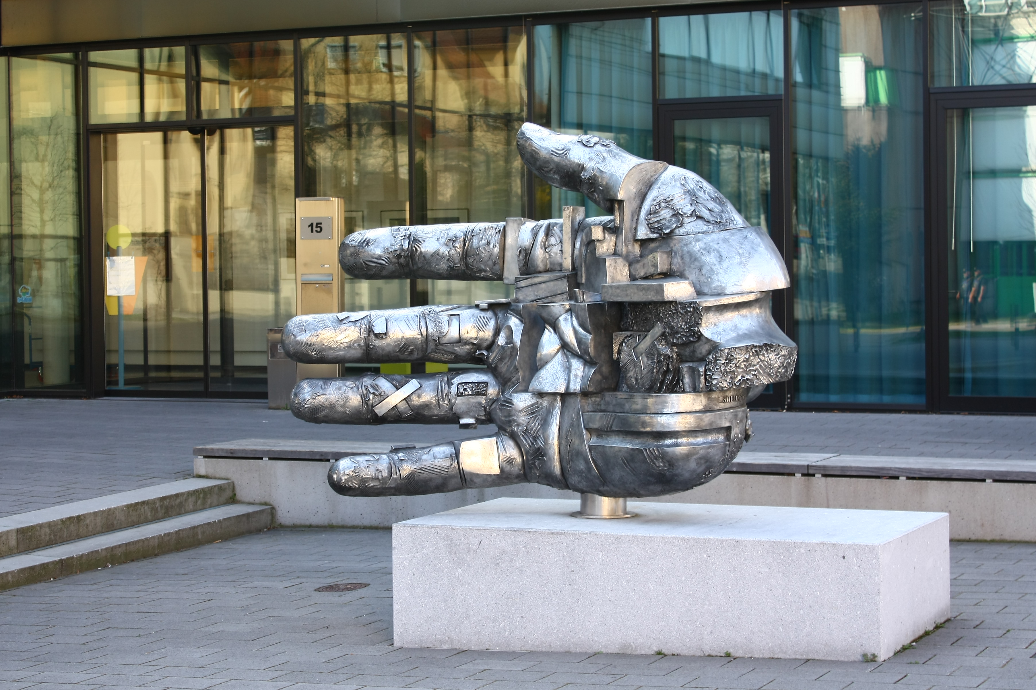 Gunther Stilling: "La Mano" (2007), vor der Volkshochschule in Neckarsulm/Deutschland (Material: Aluminium, Breite: 2,50 Meter)